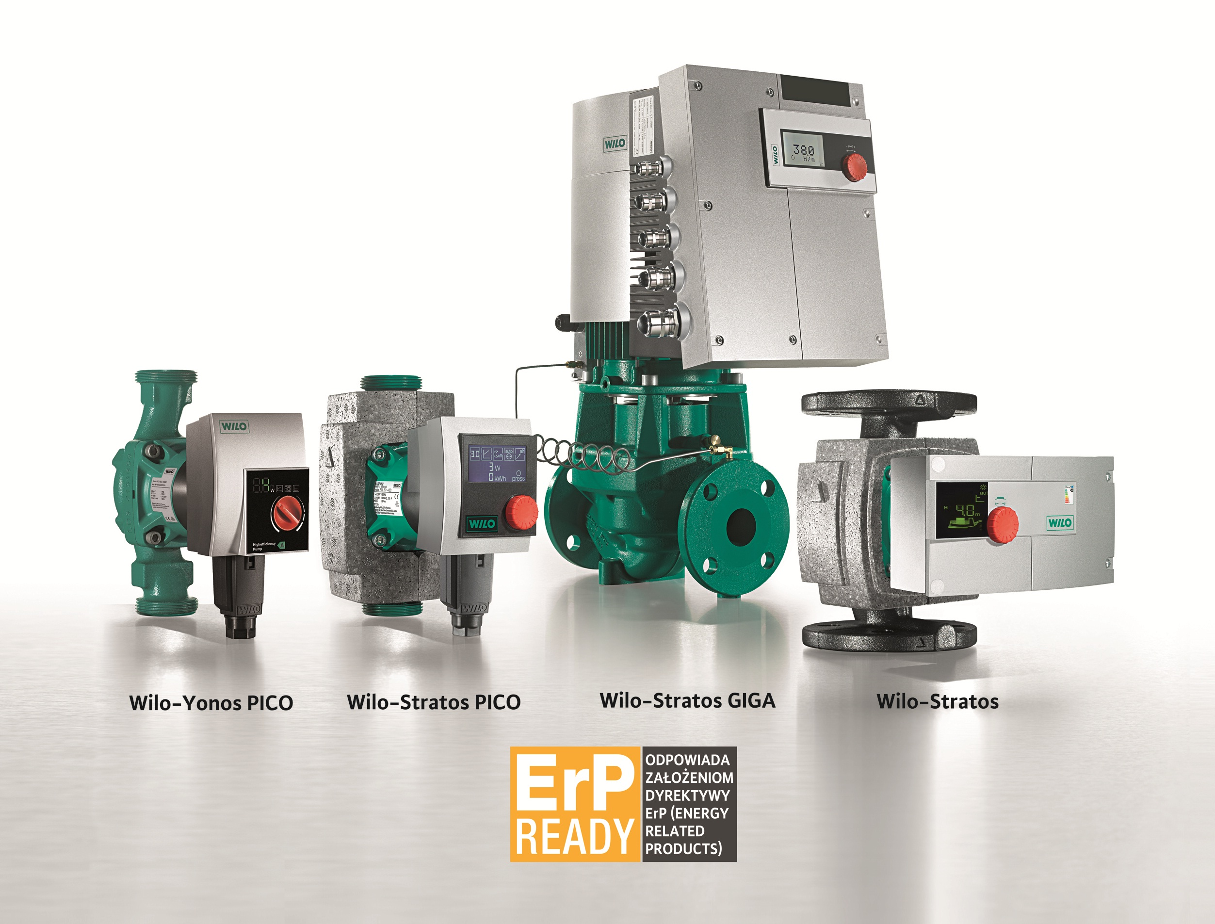 Rodzina pomp Wilo-Stratos: najbardziej efektywne energetycznie pompy obiegowe.